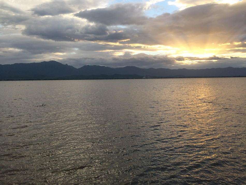 กว๊านพะเยายามเย็น